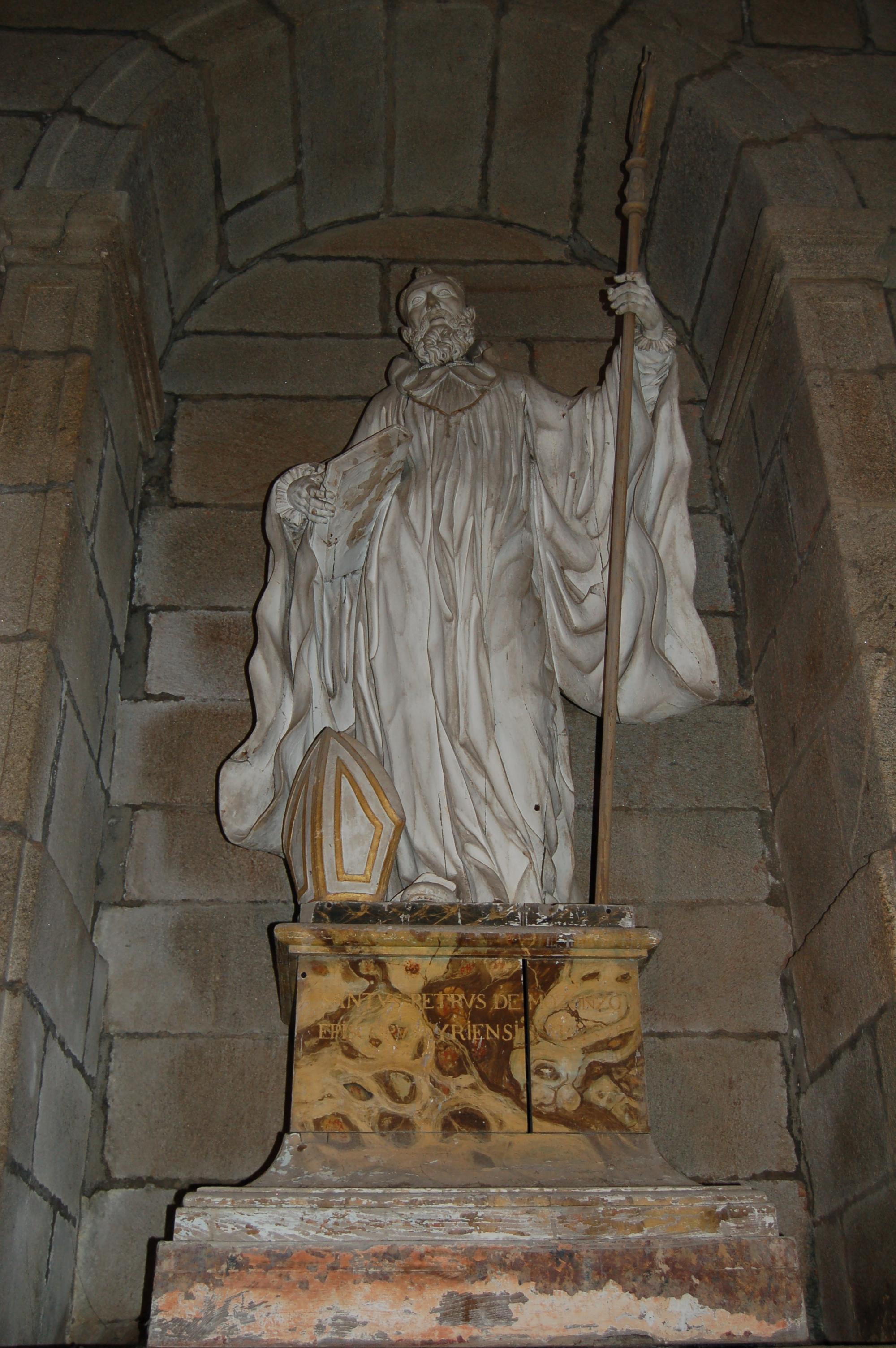 San Pedro de Mezonzo de Xosé Ferreiro na igrexa do mosteiro de San Martiño Pinario en Santiago de Compostela